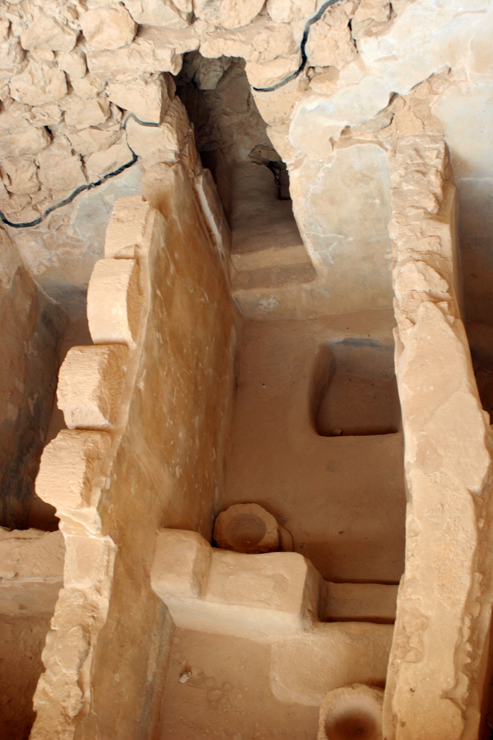 Local utilizado para curtir pele de animal Masada This place is a UNESCO World Heritage Site, listed as Masada.